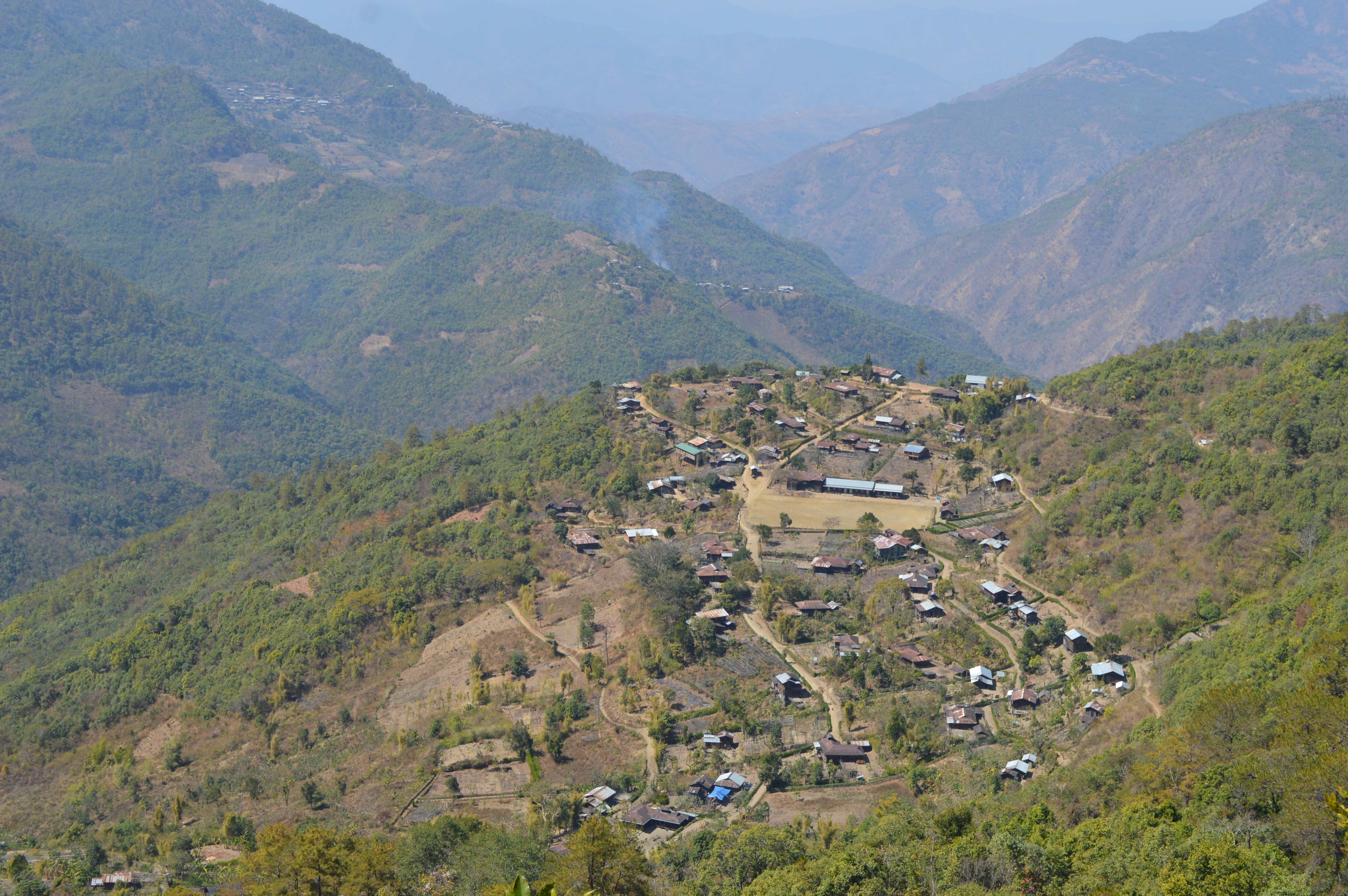 Voklak Village, Chin State, Myanmar